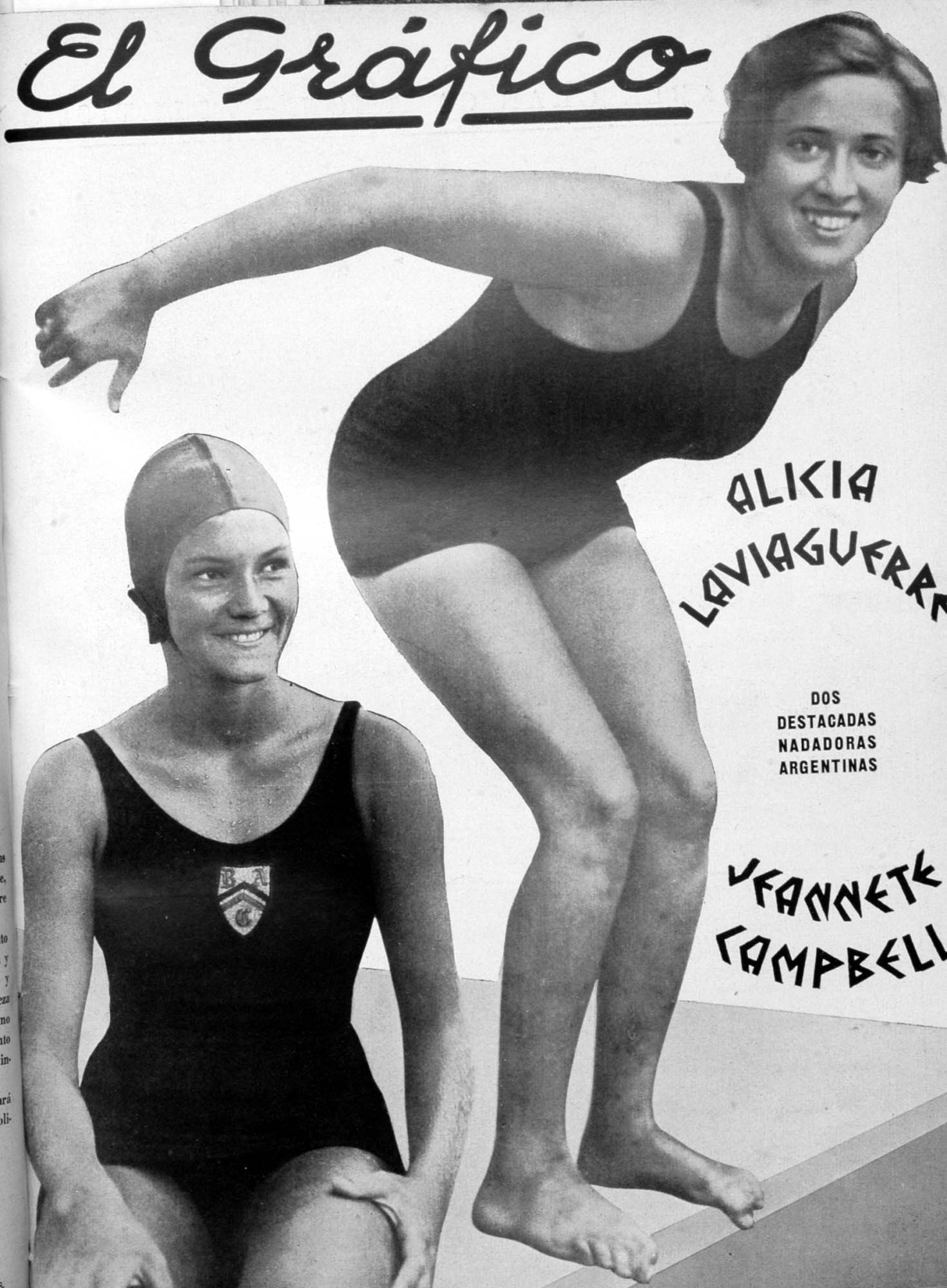 El Grafico del 21 de Marzo de 1931. Edicion 610